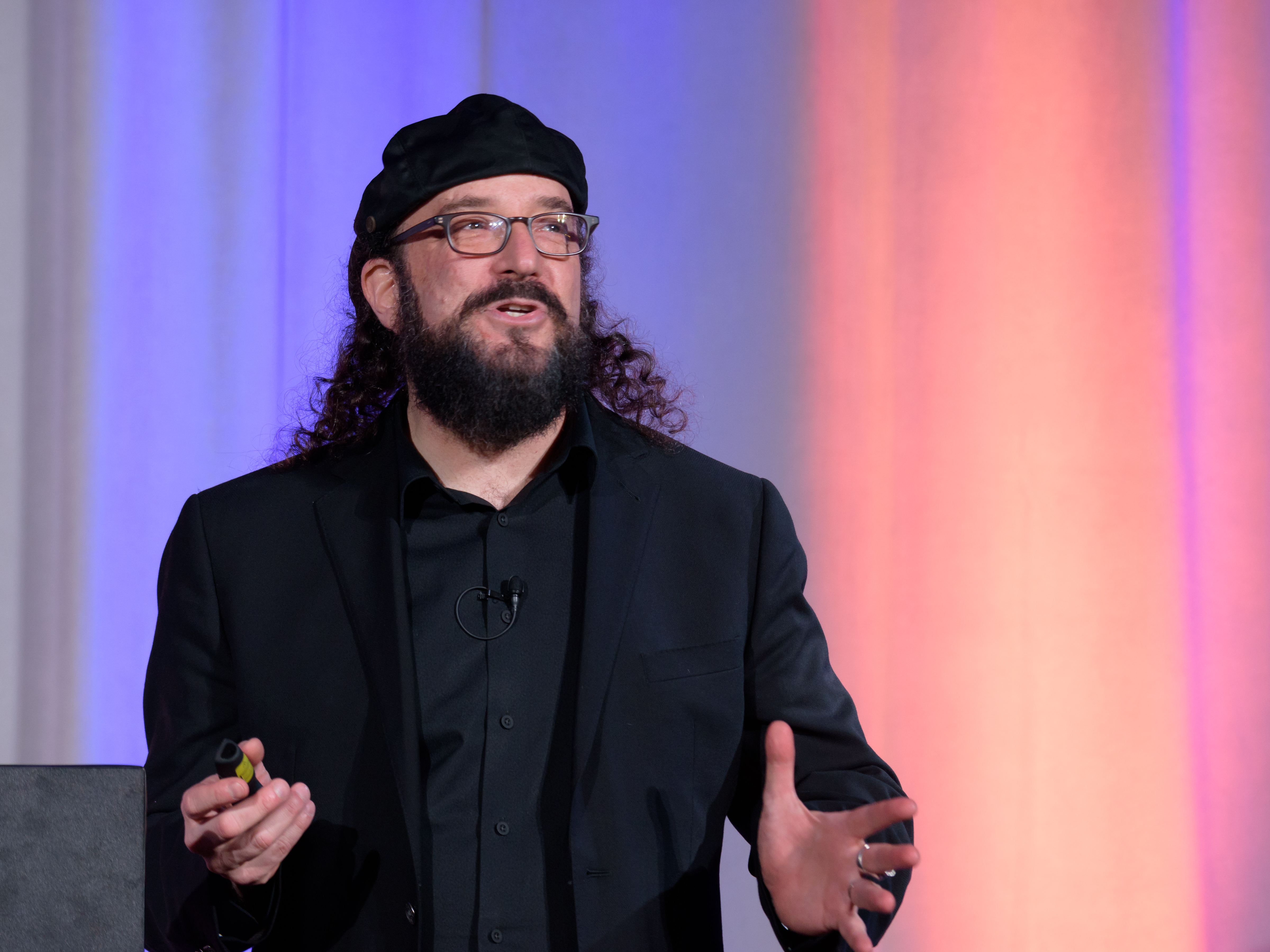 David Brommer delivering the opening remarks at OPTIC 2019.